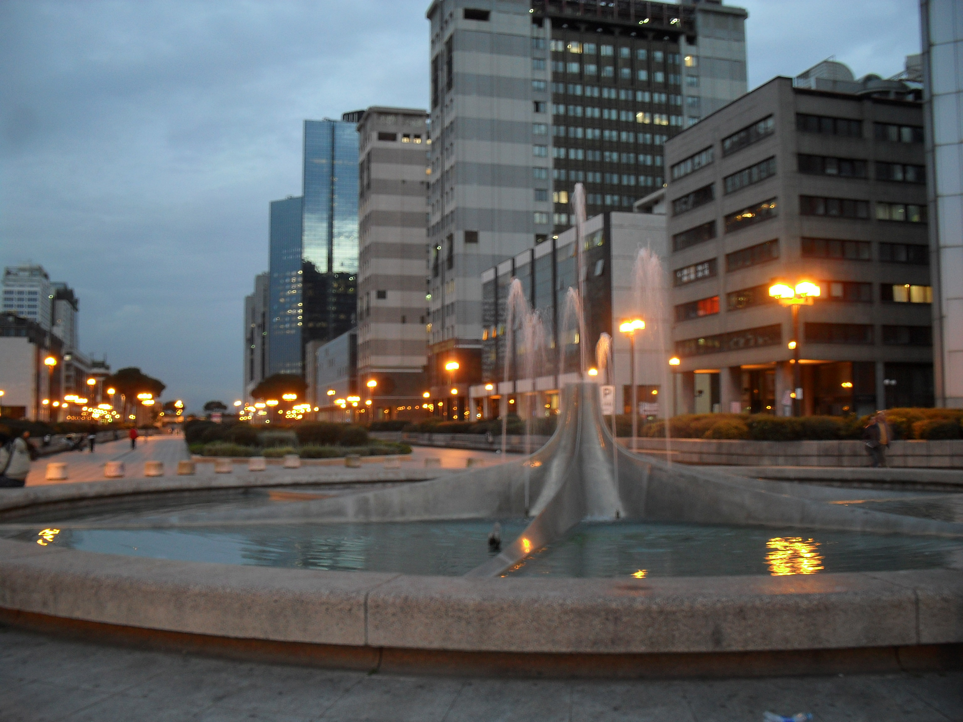 Fontana del Centro Direzionale di Napoli